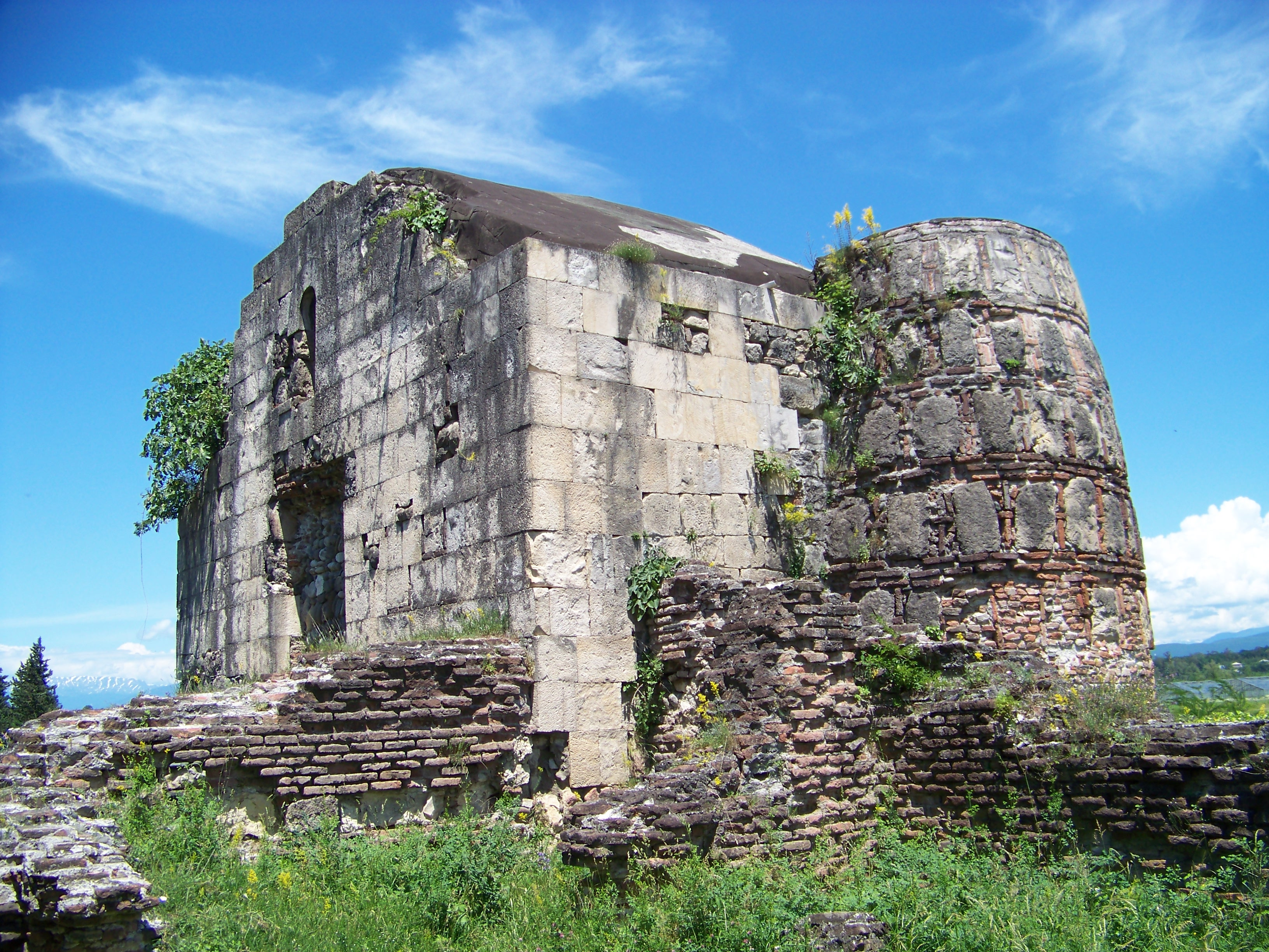 გეგუთის სასახლე - სხვა ნაგებობანი